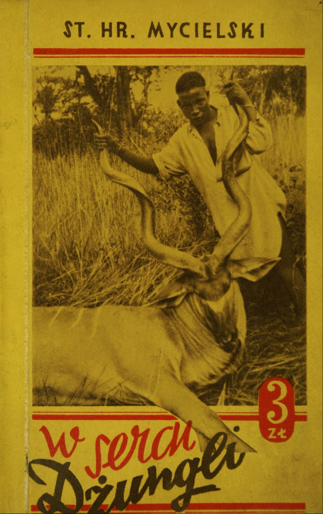 Okładka książki Stanisława hr. Mycielskiego "W sercu dżungli", Wydawnictwo Polskie R. Wegner